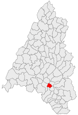 Categorie:Hărţi ale judeţului Bihor